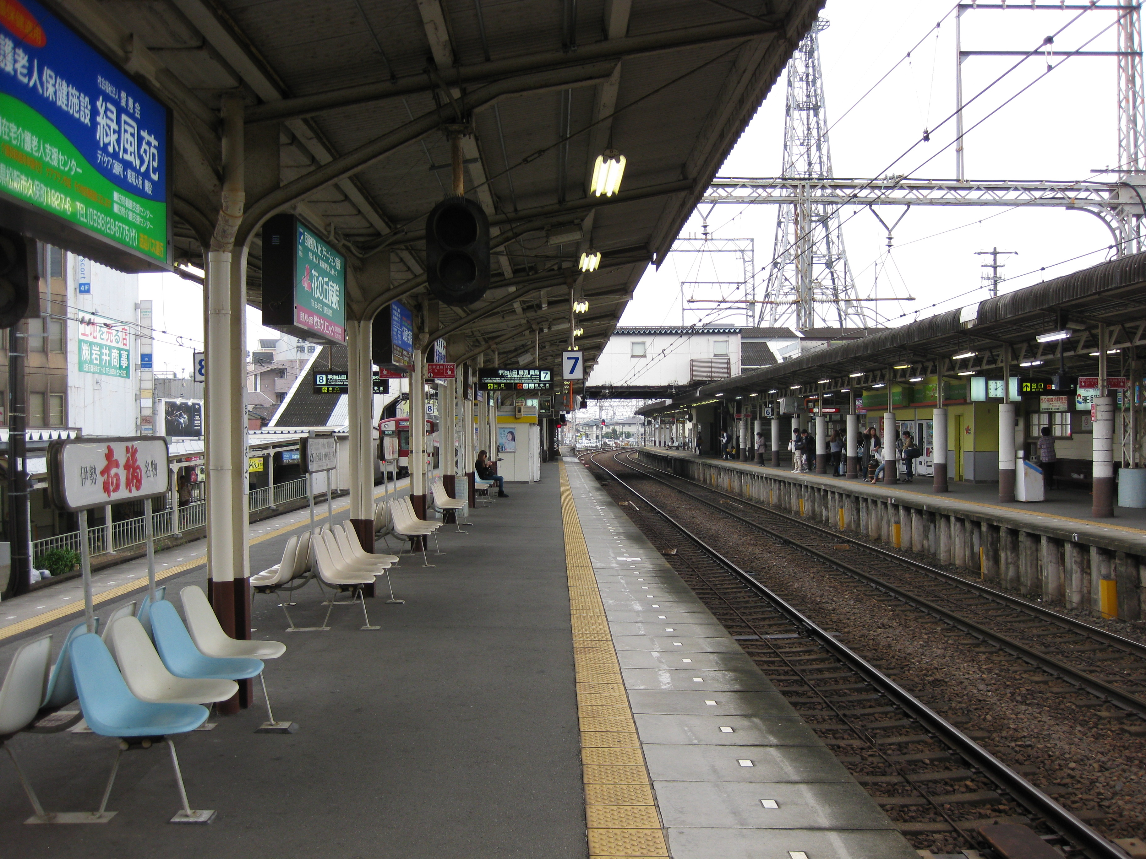 近鉄松阪駅プラットホーム